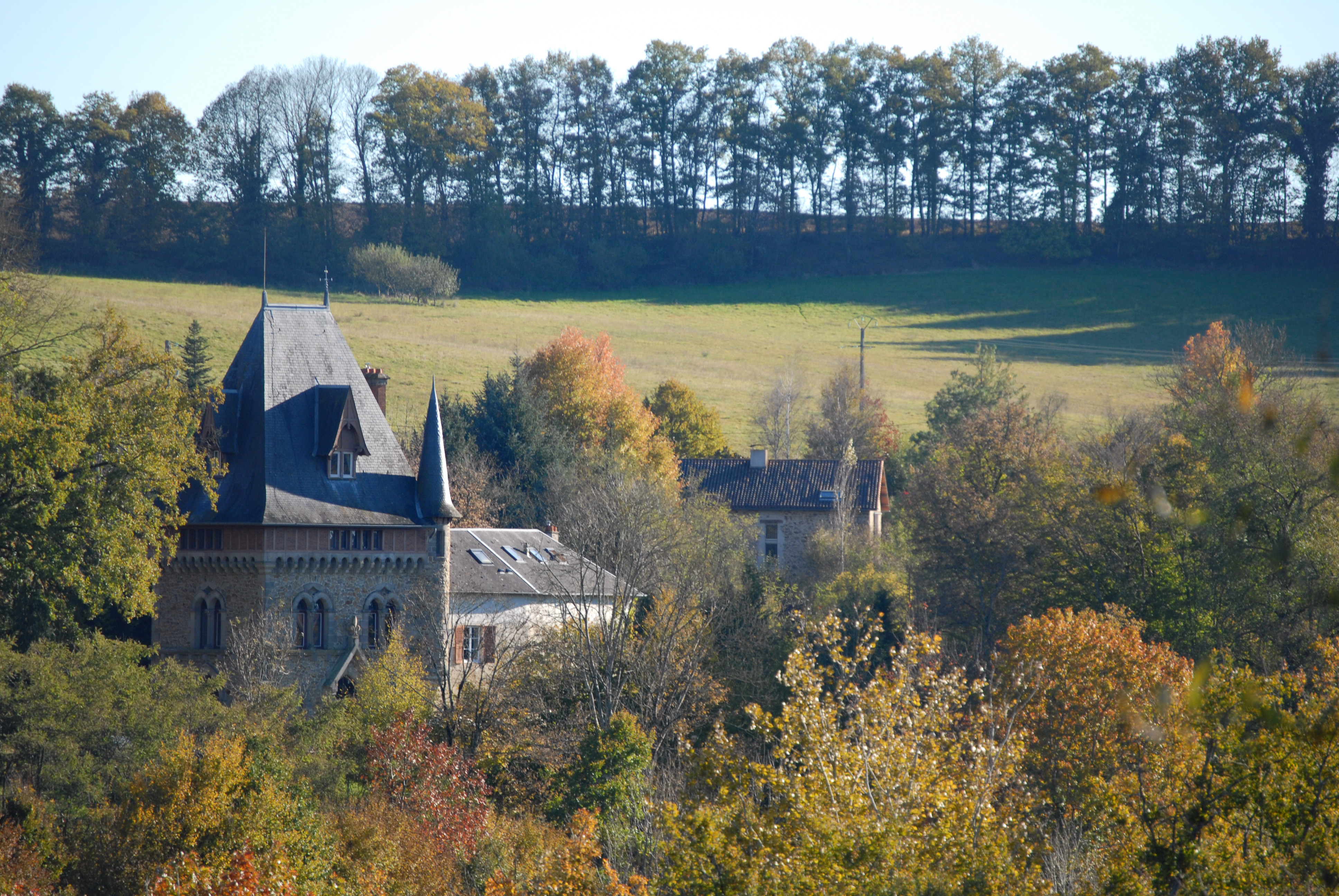 Château de Gigondas Commune d'Isle (Haute Vienne)